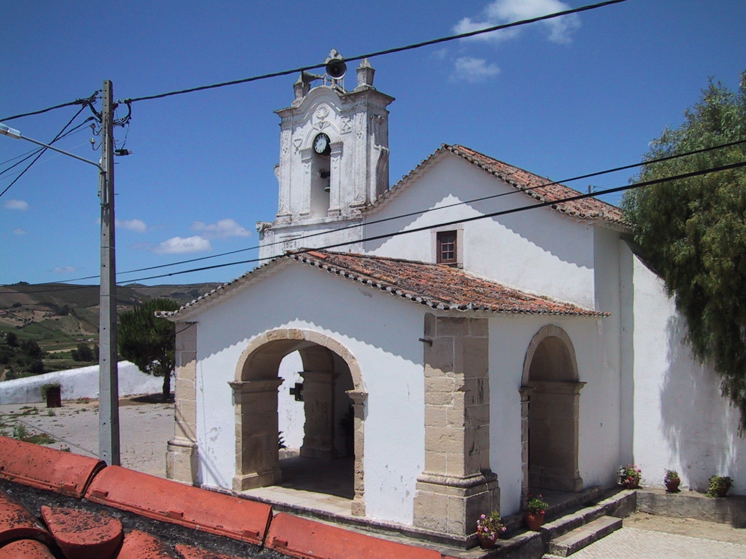 Imagem Frontal da Igreja de Cabanas de Torres